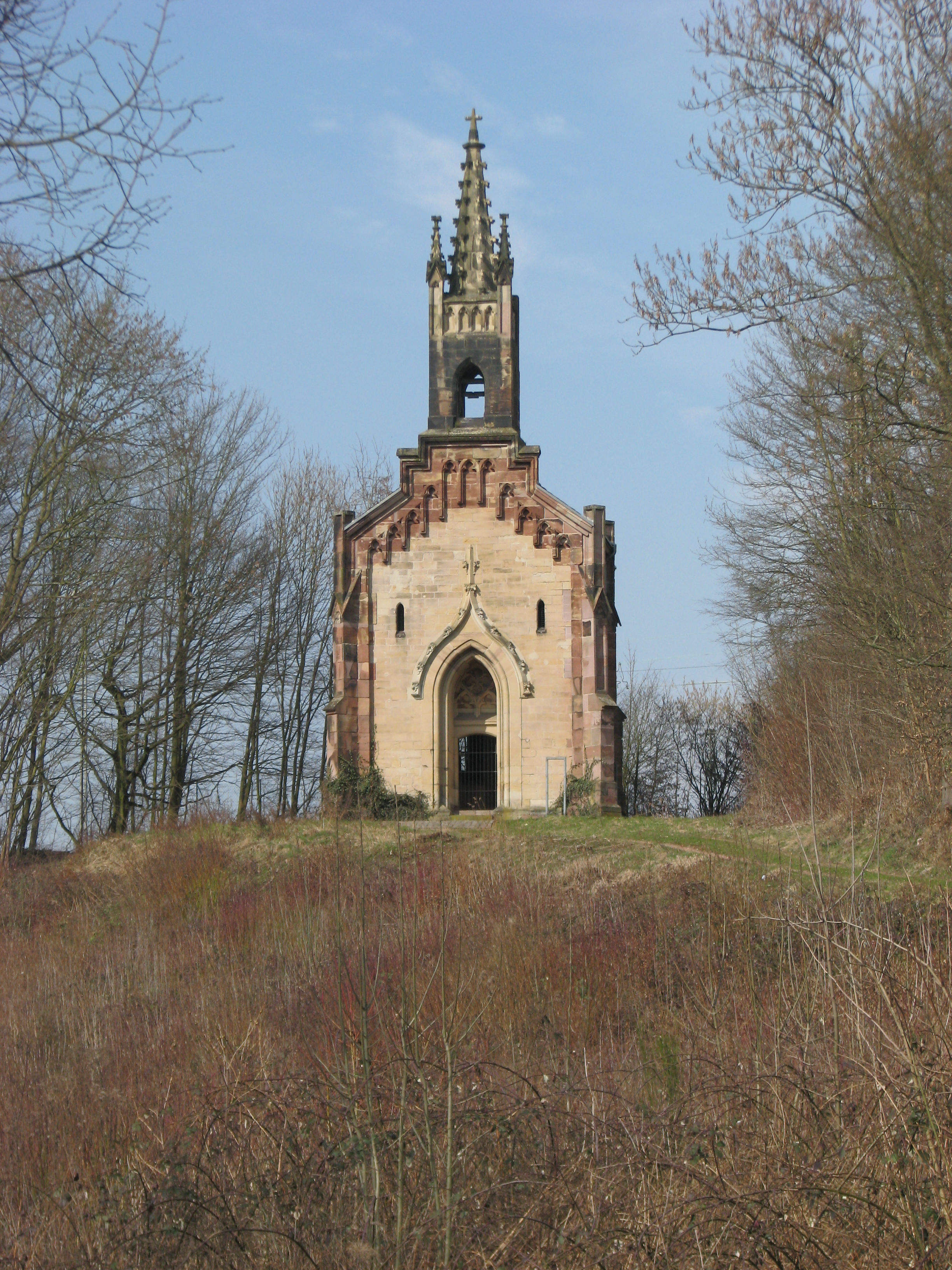 Die Stummsche Kapelle in Neunkirchen (Saar)